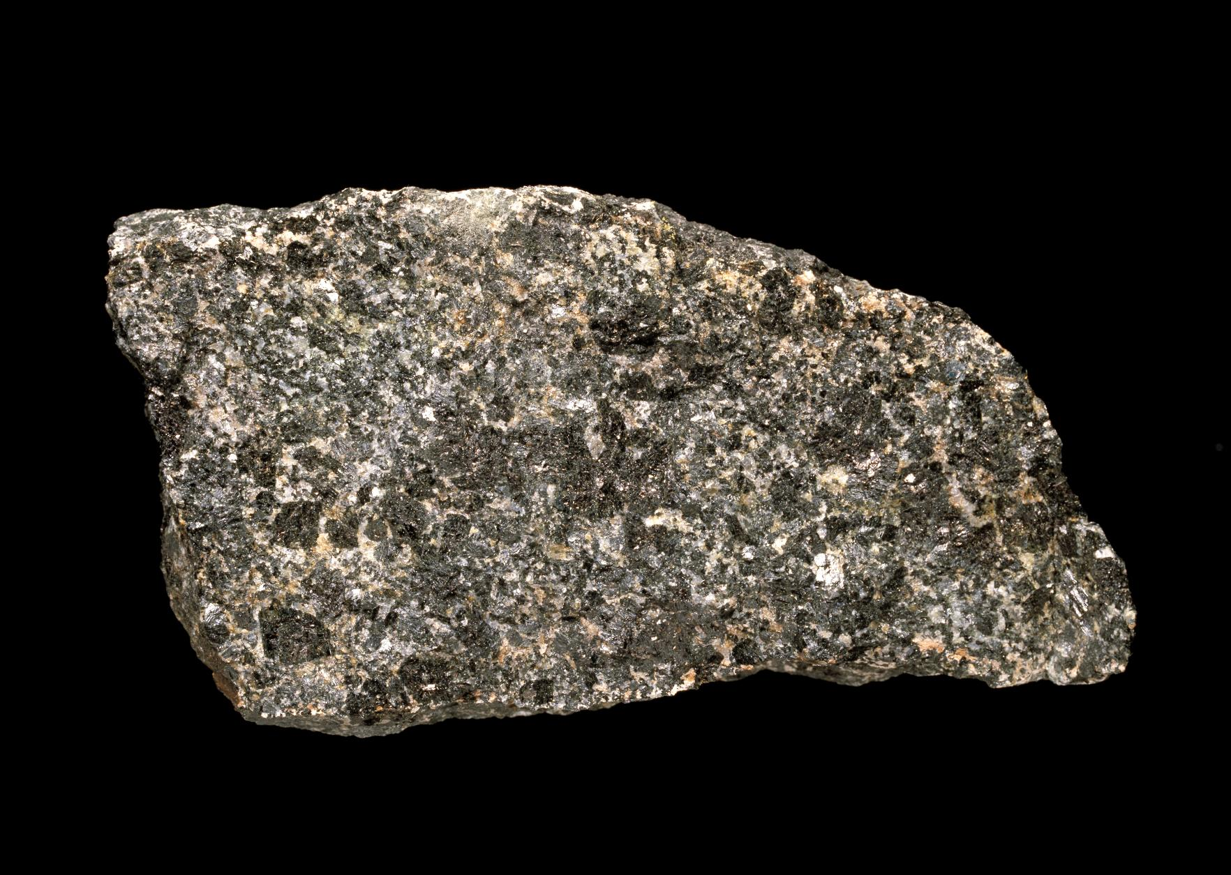 Norrbottens landskapssten är gabbron. Gabbro bildas på stora djup, oftast i den oceaniska jordskorpan när en basisk magma stelnat. Gabbron förekommer över hela Norrbotten i flera kvadratkilometer stora områden. Tillsammans med andra besläktade mörka bergarter kallas den ibland för grönsten eftersom den frigör näringsämnen som gör att grönalger och mossor trivs på ytan när den vittrar. Gabbron är en ekonomiskt viktig bergart eftersom den kan vara brytvärd. Den är nämligen en typisk värdbergart för malmer av nickel-koppar, titan-vanadin och platinagruppens element (PGE). I Norrbotten har gabbro bl.a. brutits under namnet "kallaxit" och använts av SSAB i Luleå för exempelvis ugnsinfordring i stålverket. Bergarten ger också skogen högre bonitet (kubikmeter skog per hektar och år). Som byggnadssten används gabbro flitigt. Den är blå-svart, grovkristallin och består huvudsakligen av kalciumrik plagioklas, hornblände och pyroxen, samt ibland olivin.